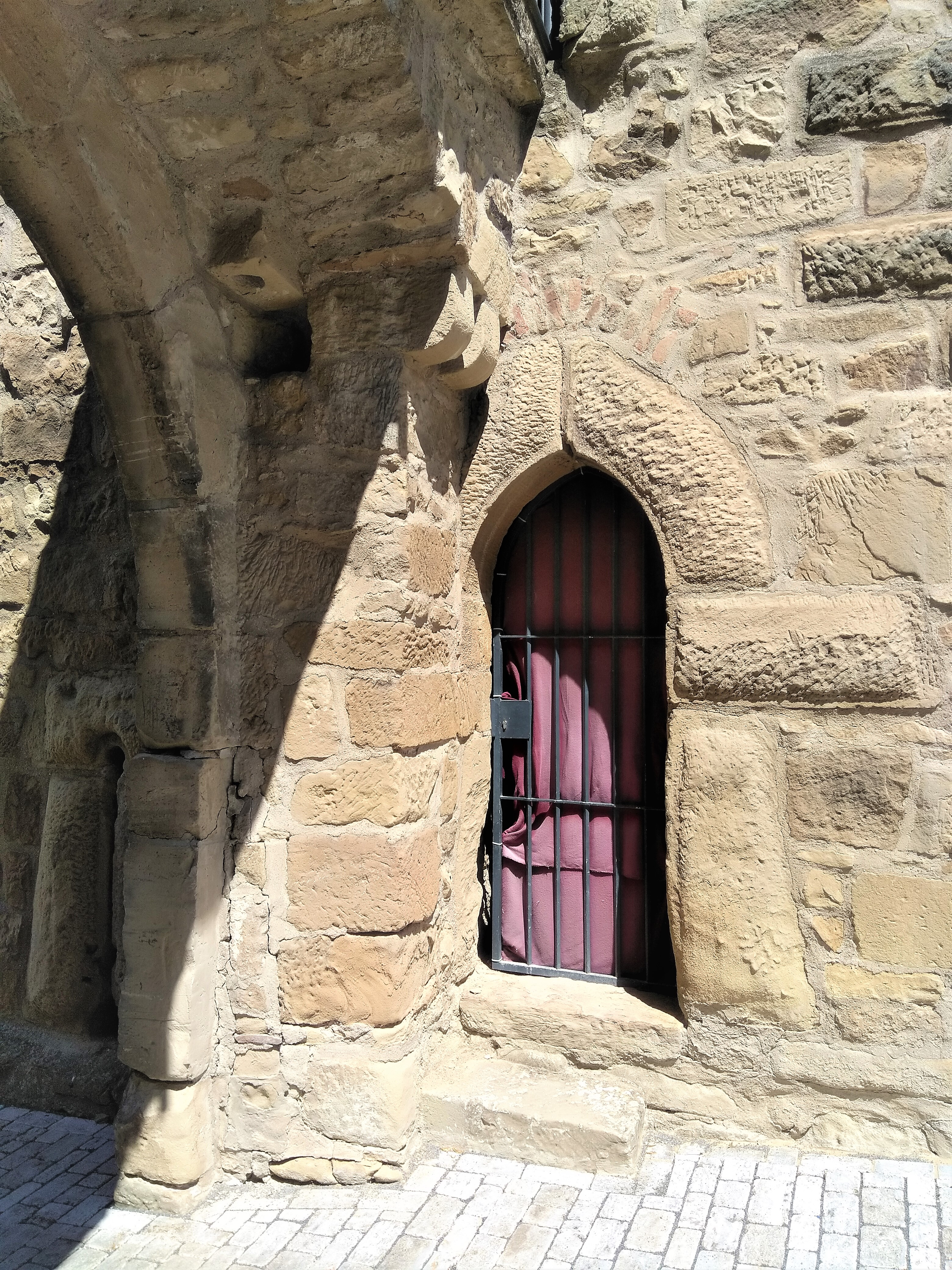 Eeslinnuse keskmise väravatorni I korruse meeskonnaruumi uks väravaava taga. Vasakul ülal on näha värava võllhinge kinnitusauku. Samasugune oli ka maapinna tasandil.